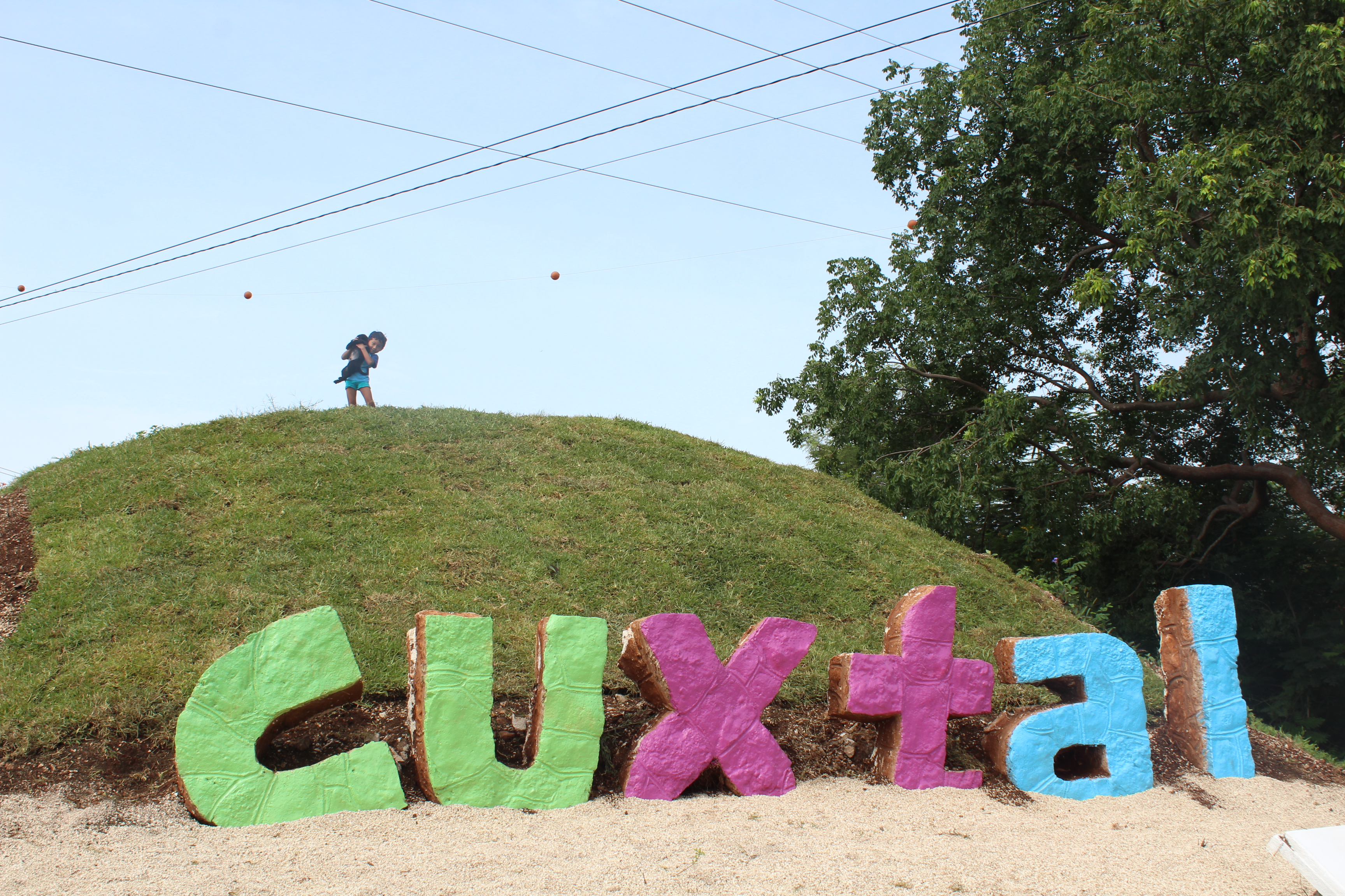 Entrada de la Reserva Cuxtal